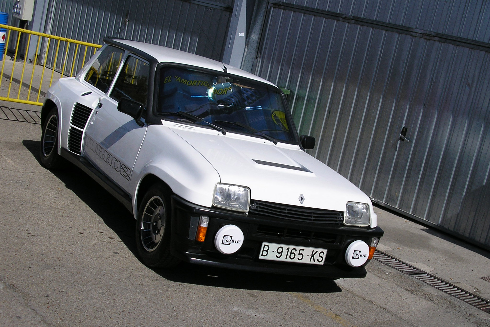 Renault 5 Maxiturbo shown in Circuito del Jarama (Madrid). Jornada de puertas abiertas 2006.